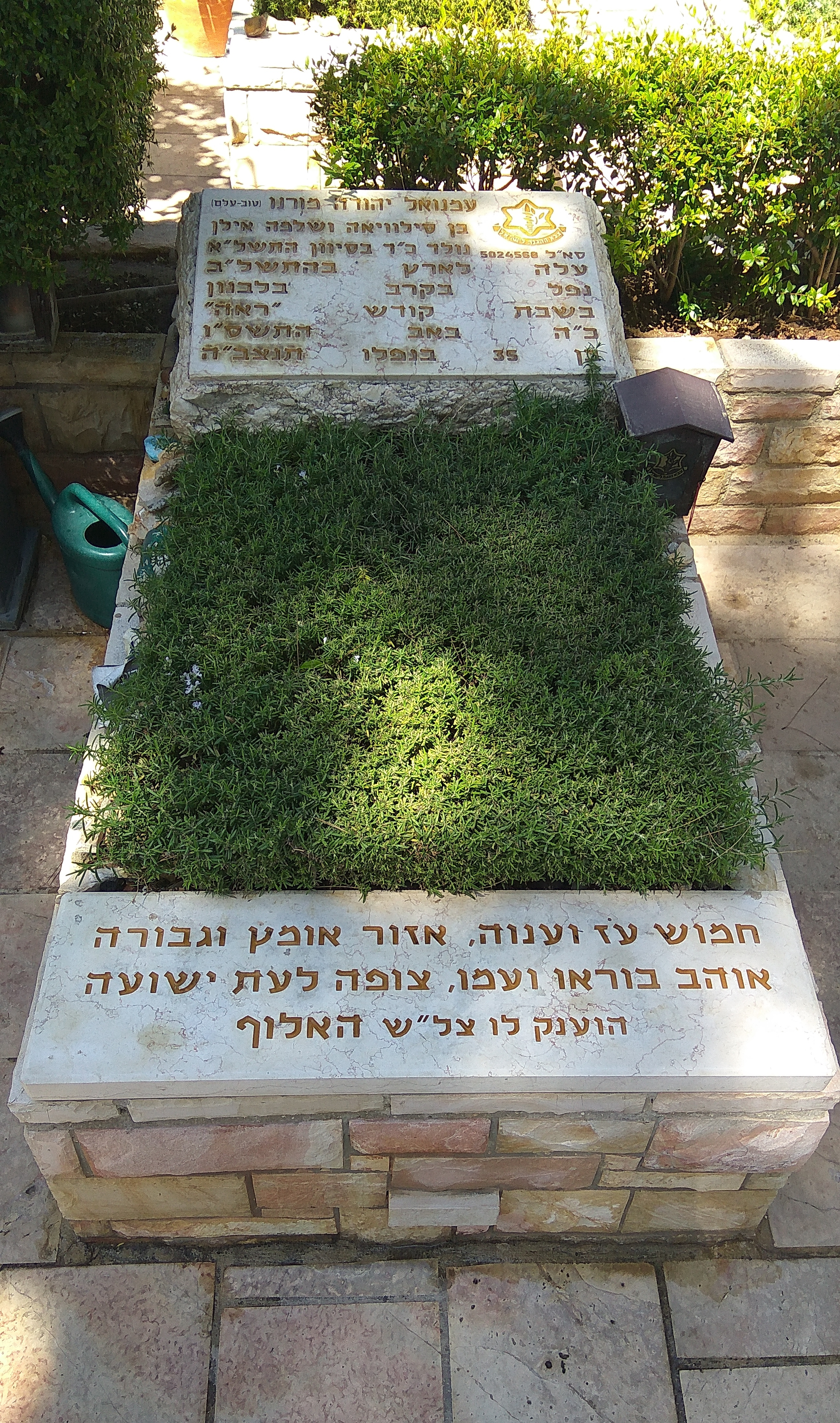 המצבה שעל קברו של עמנואל מורנו בהר הרצל